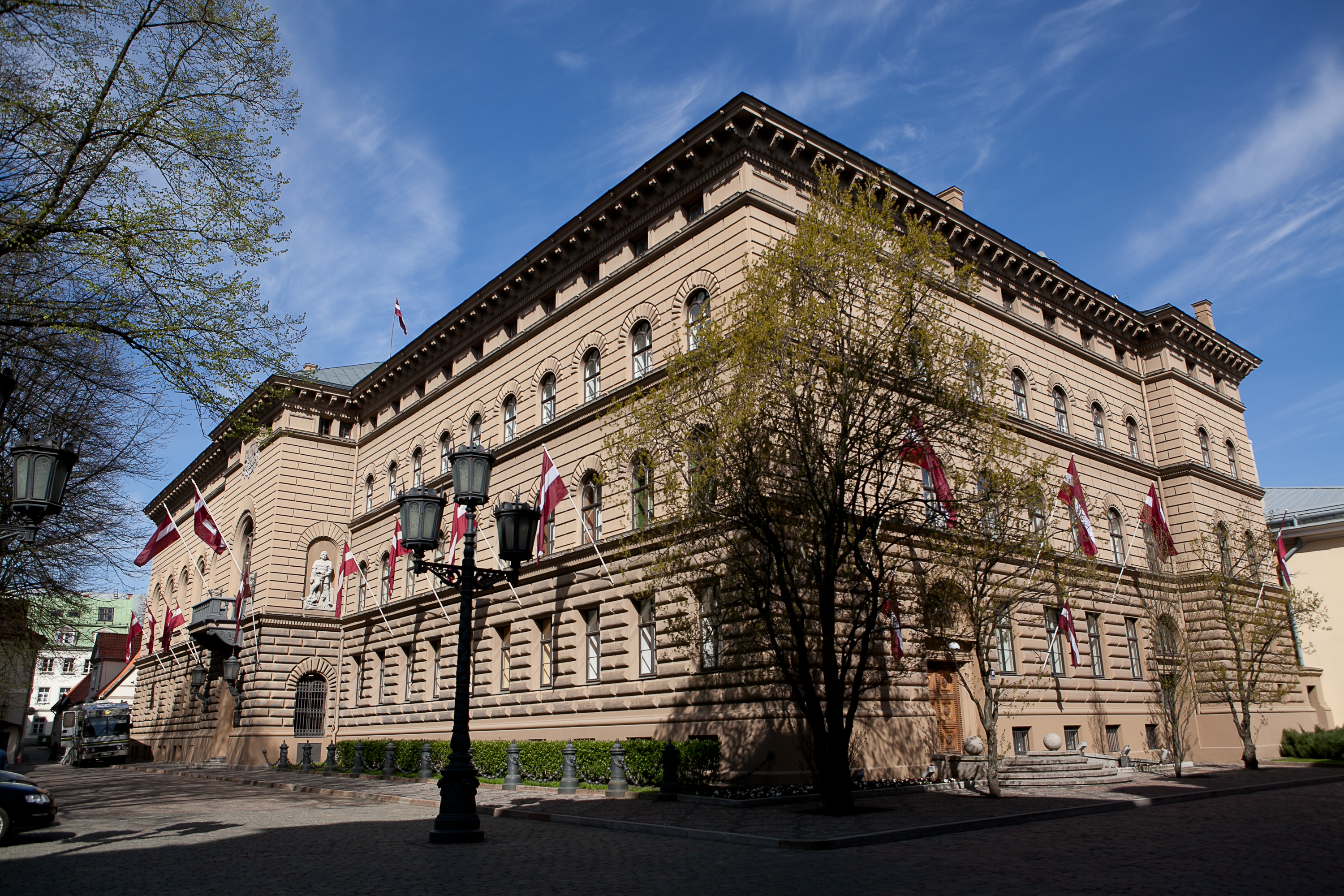 2012.gada 4.maijs. Saeimas nams svētku noformējumā. Foto: Ernests Dinka, Saeimas Kanceleja.